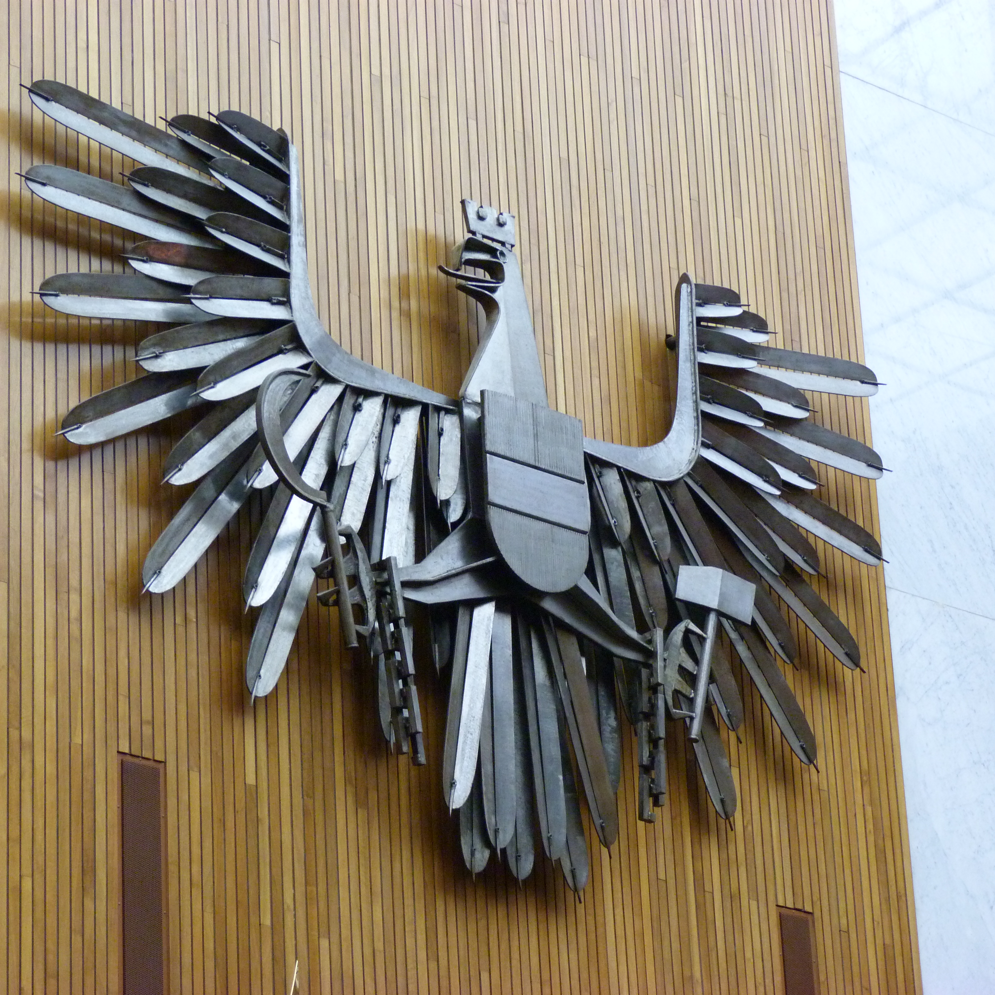 A felvétel 2014. december 3-án, szerdán készült. Bécs, Ausztria. Parlament. ©© Derzsi Elekes Andor, Budapest, 2014, A kép egészben, vagy részletekben másolását, bármilyen úton történő sokszorosítását és felhasználását a szerző ellenérték nélkül, jogutódjaira is kihatóan megengedi. Az engedély kiterjed a kereskedelmi célú hasznosításra is. Kéri azonban nevének feltüntetését a felhasználás során. A Metapolisz sorozat valamennyi képe és filmje Creative Commons alatti valamint kereskedelmi - for profit - célra is felhasználható. Ajánlott hivatkozás: Derzsi Elekes Andor: Metapolisz DVD line